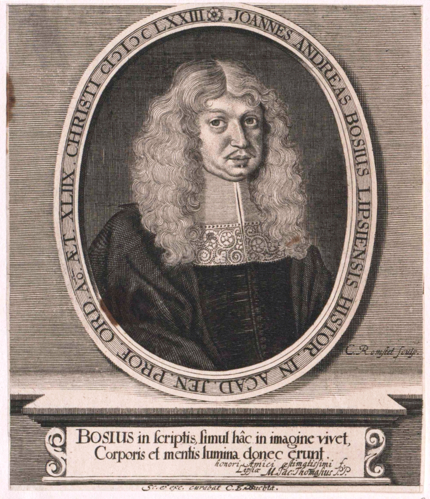 Johann Andreas Bose (1626–1674), deutscher Historiker